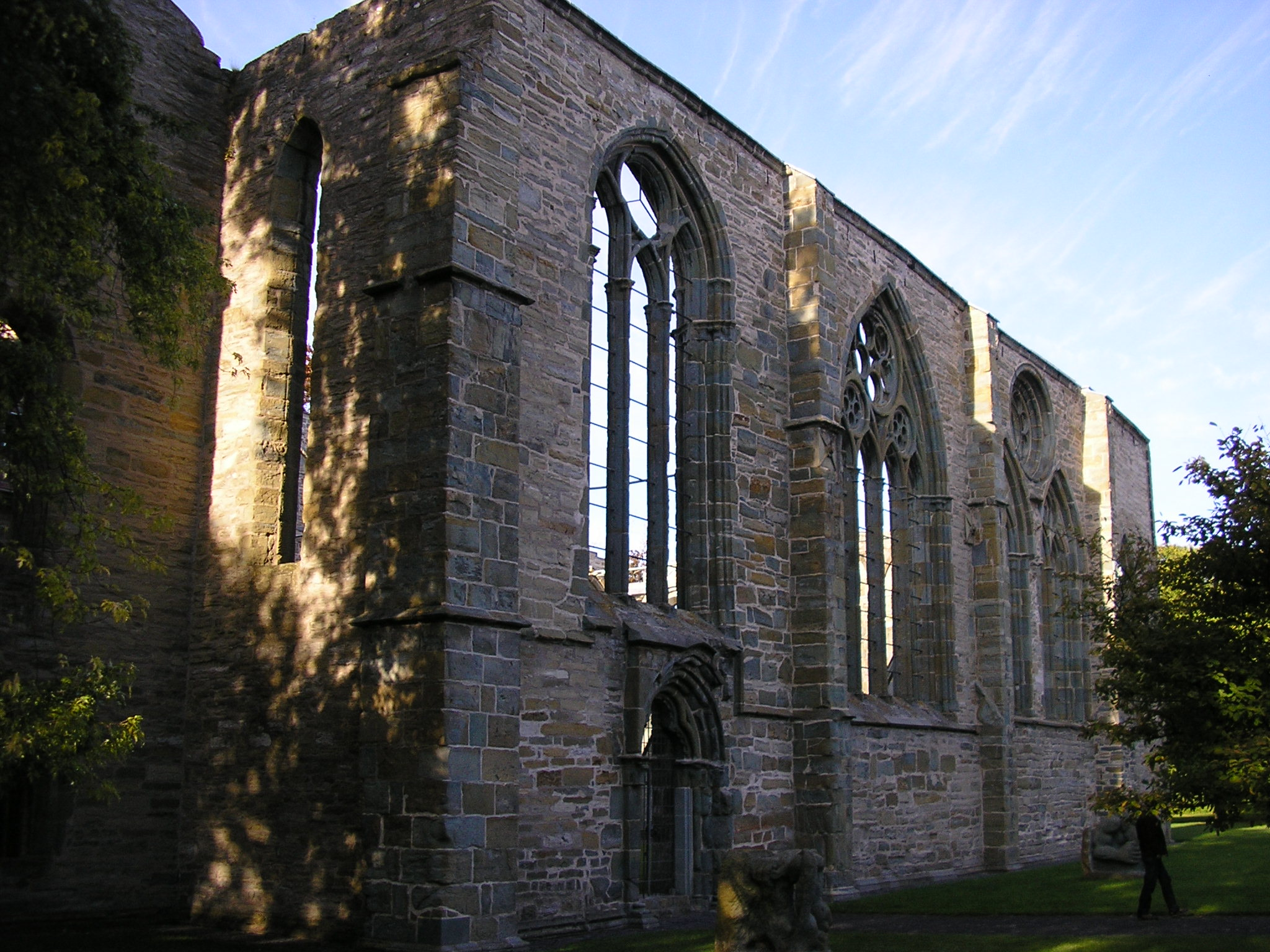 Ruine Augustinerinnenkloster zu Lippstadt